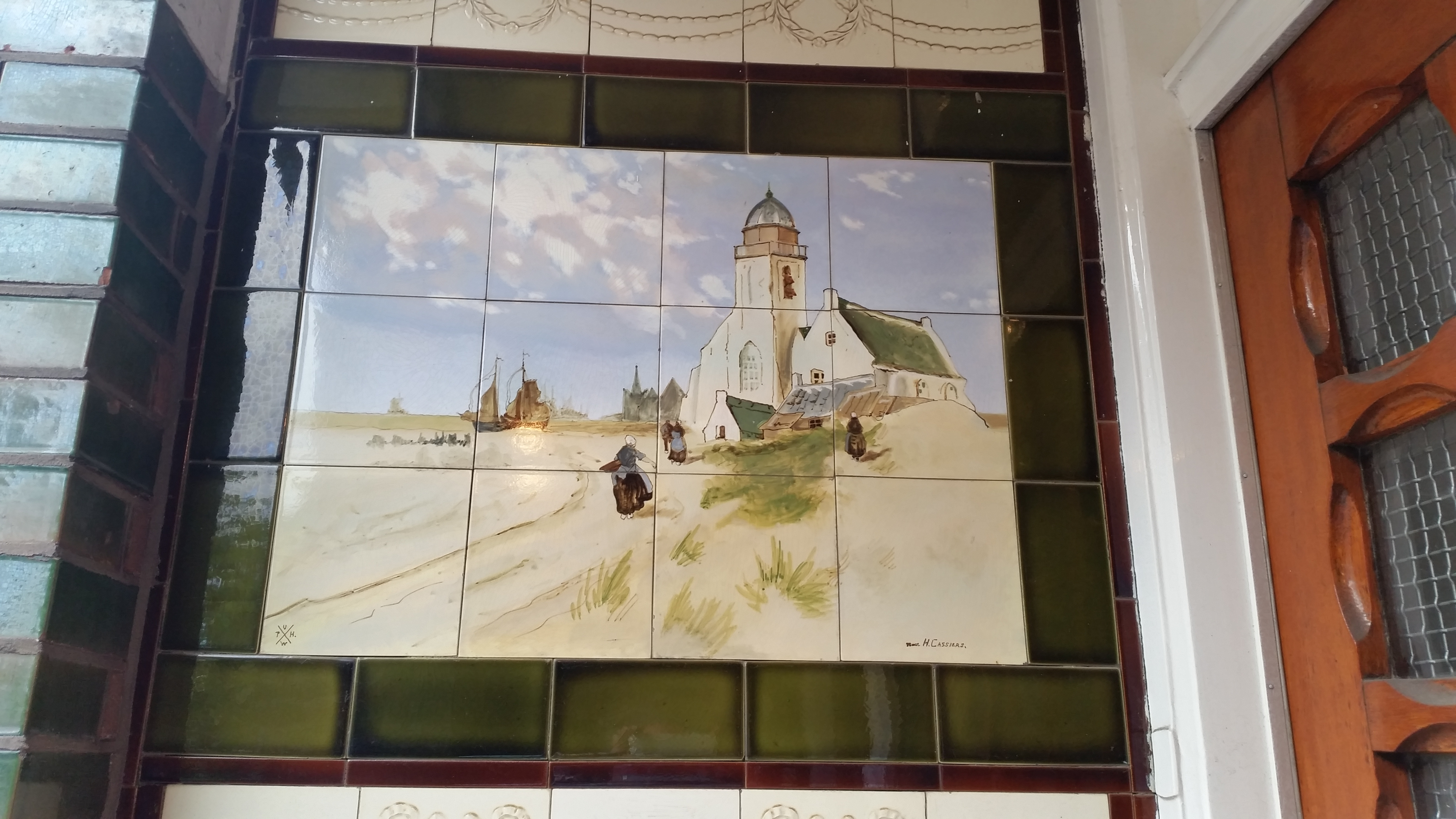 Admiraal de Ruijterweg 1-100, Amsterdam, tegelwerk portiek nummer 52